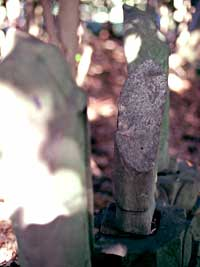 Kesakiri-Jizō (袈裟切り地蔵, 東海道五十三次・白須賀宿)